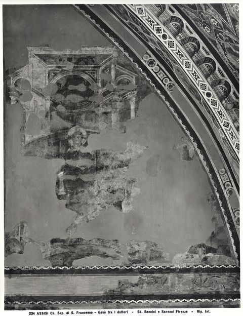 Maestro romano o giovane giotto, disputa nel tempio